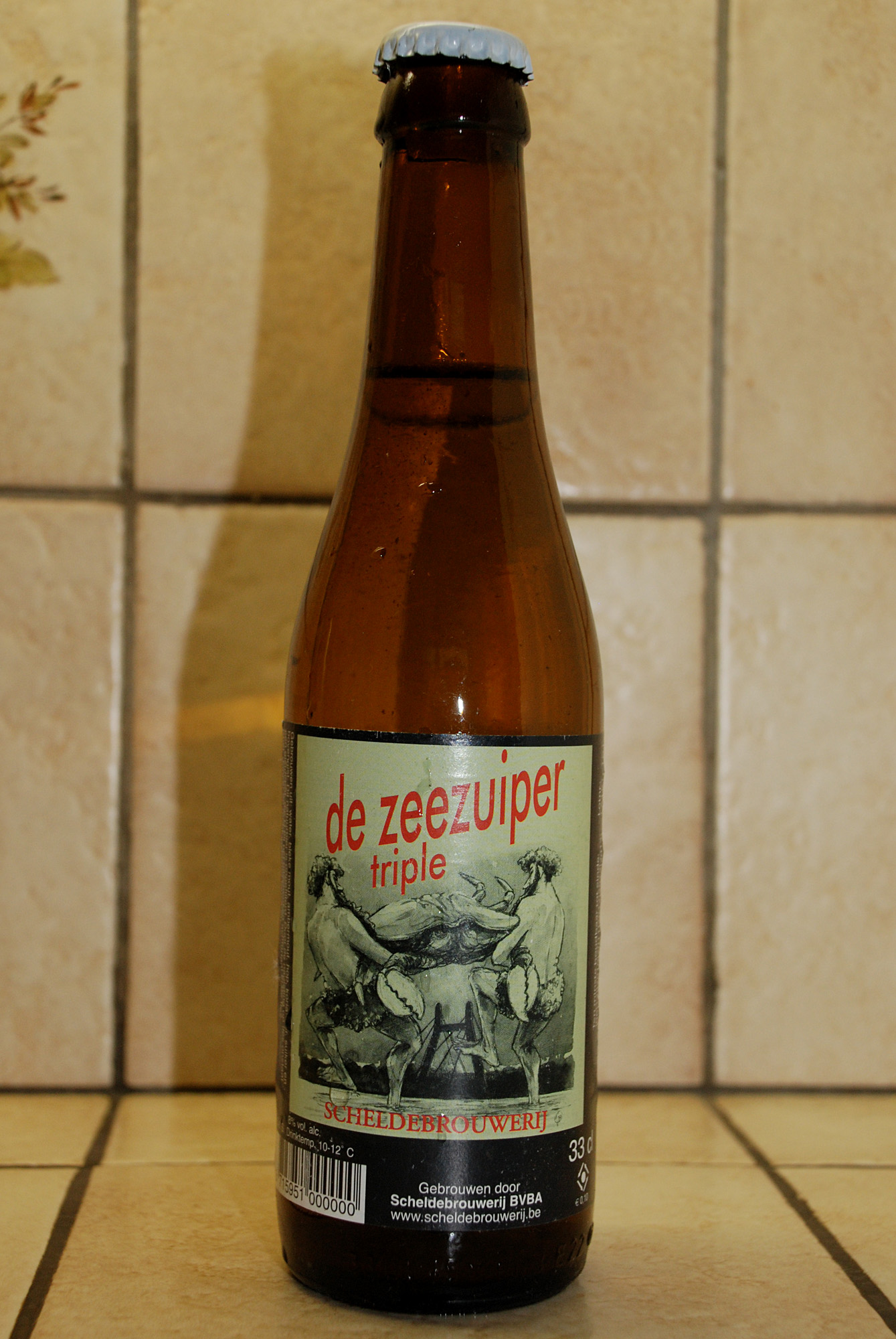 De Zeezuiper Belgisch-Nederlands bier